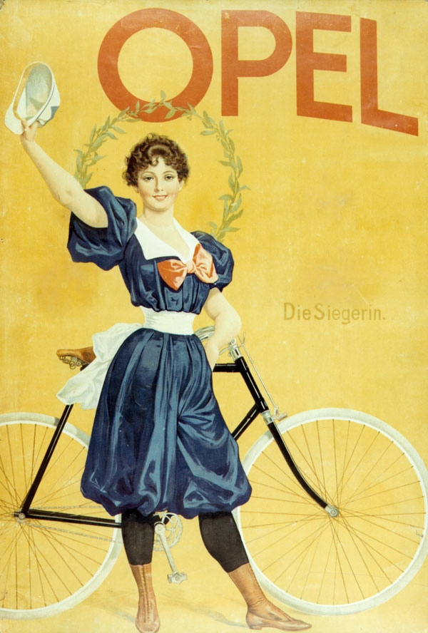 Werbeplakat, Opel, Die Siegerin 1898, Lithografie